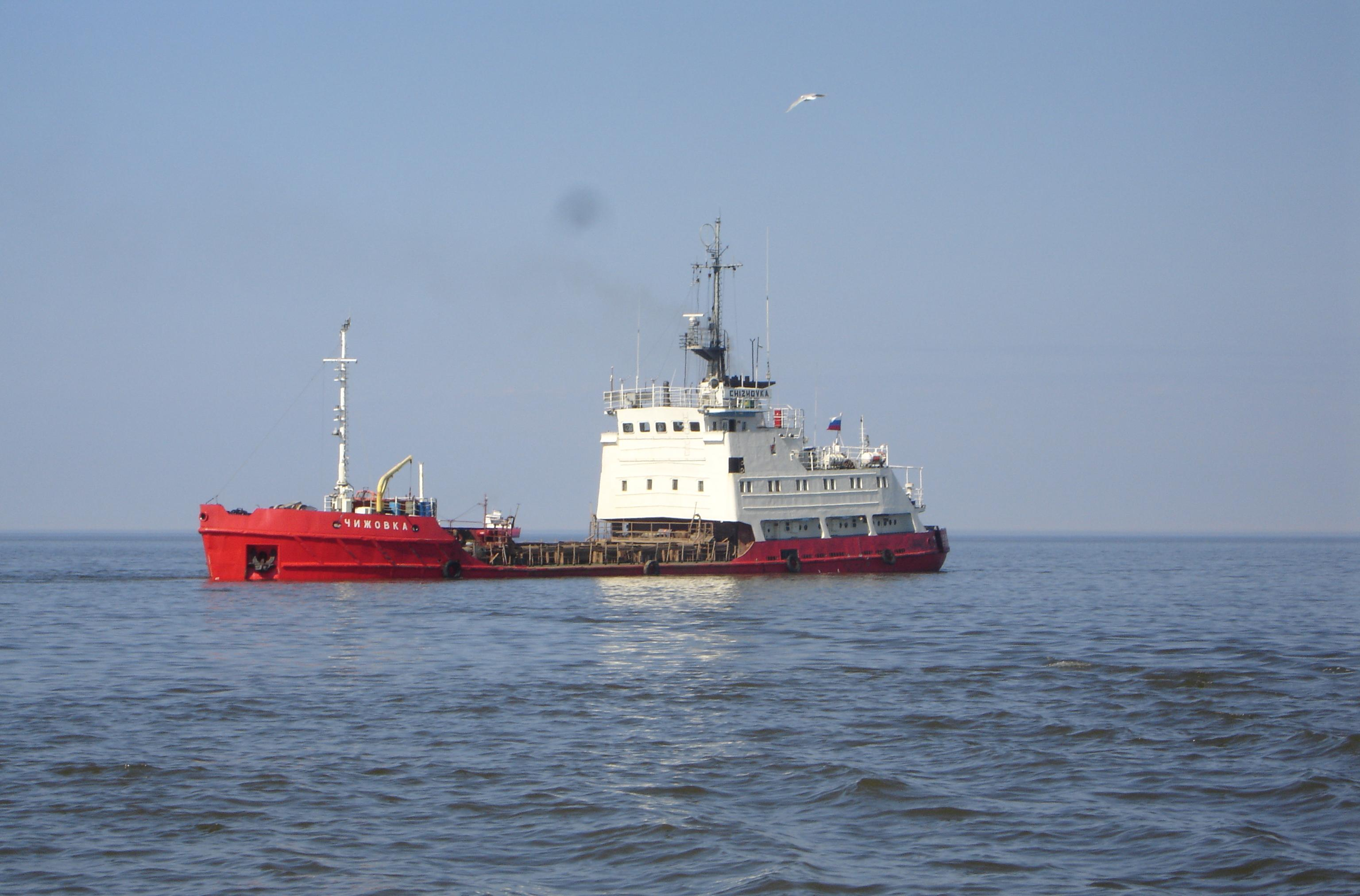 шаланда грунтоотвозная Чижовка